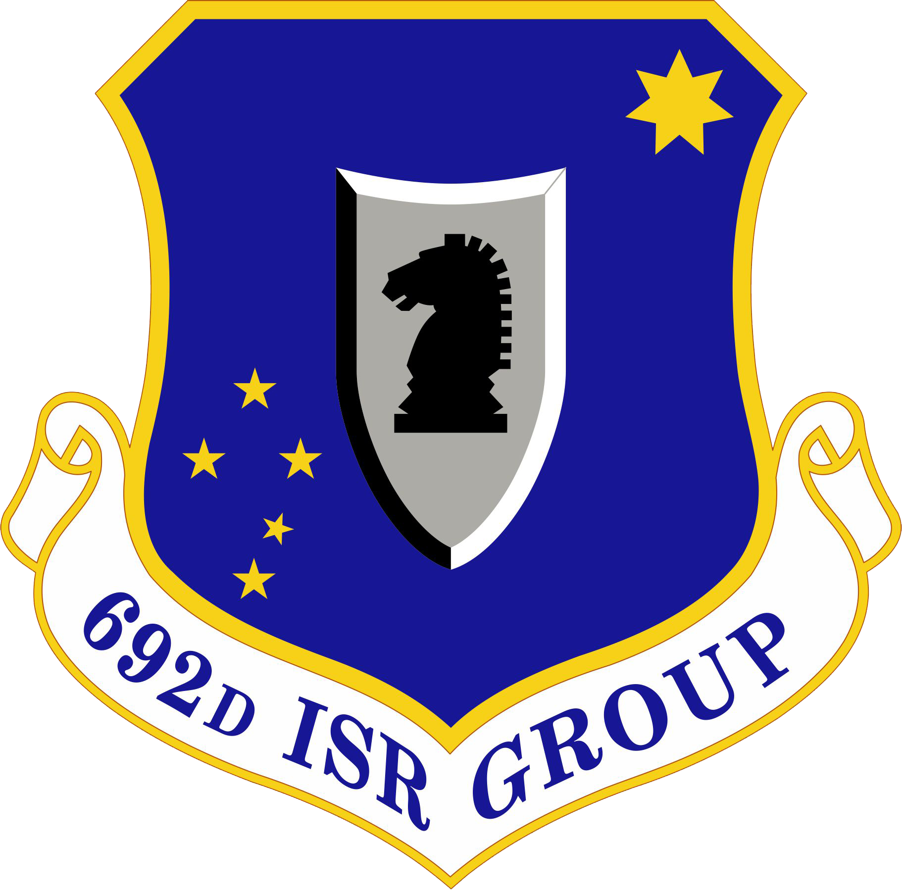 692d ISR Group emblem